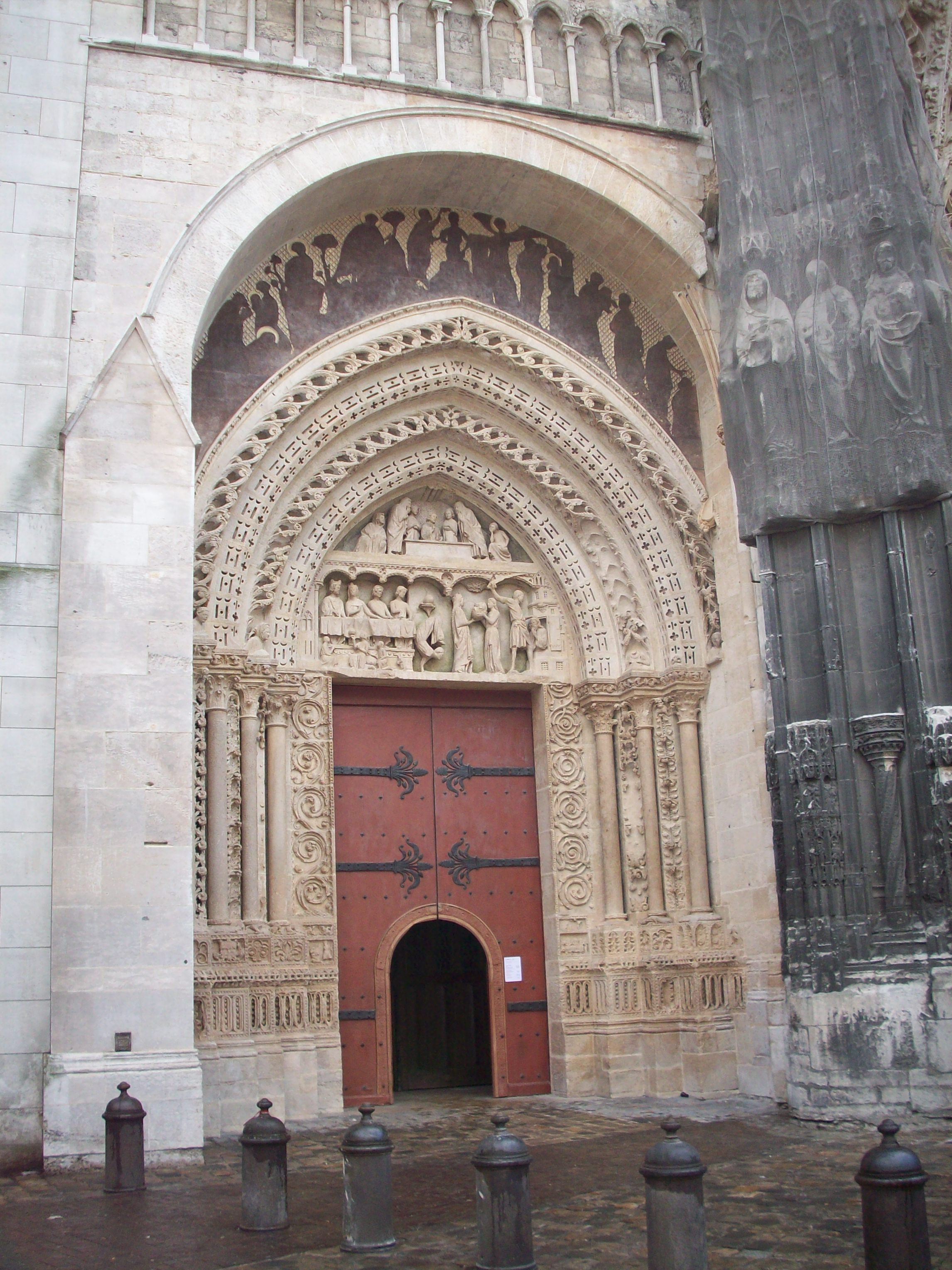 Portail Saint-Jean, restauré et nettoyé.